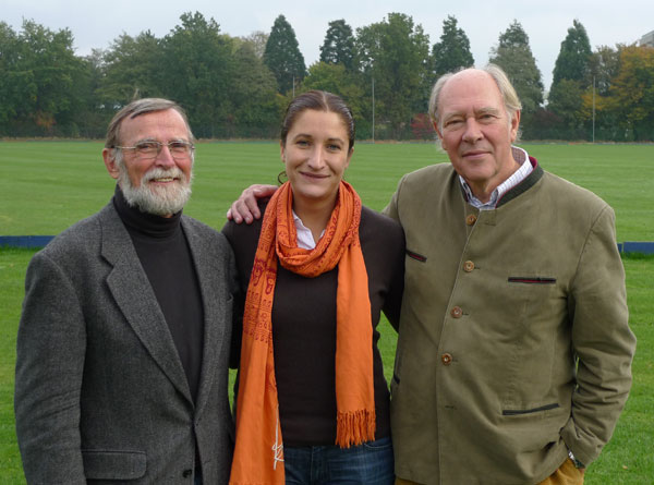 Das am 10.10.2009 neu gewählte Präsidium des Deutschen Poloverbandes DPV e.V.. Von links nach rechts: Dr. Günther Kiesel, Steffi von Pock, Hans Albrecht von Maltzahn